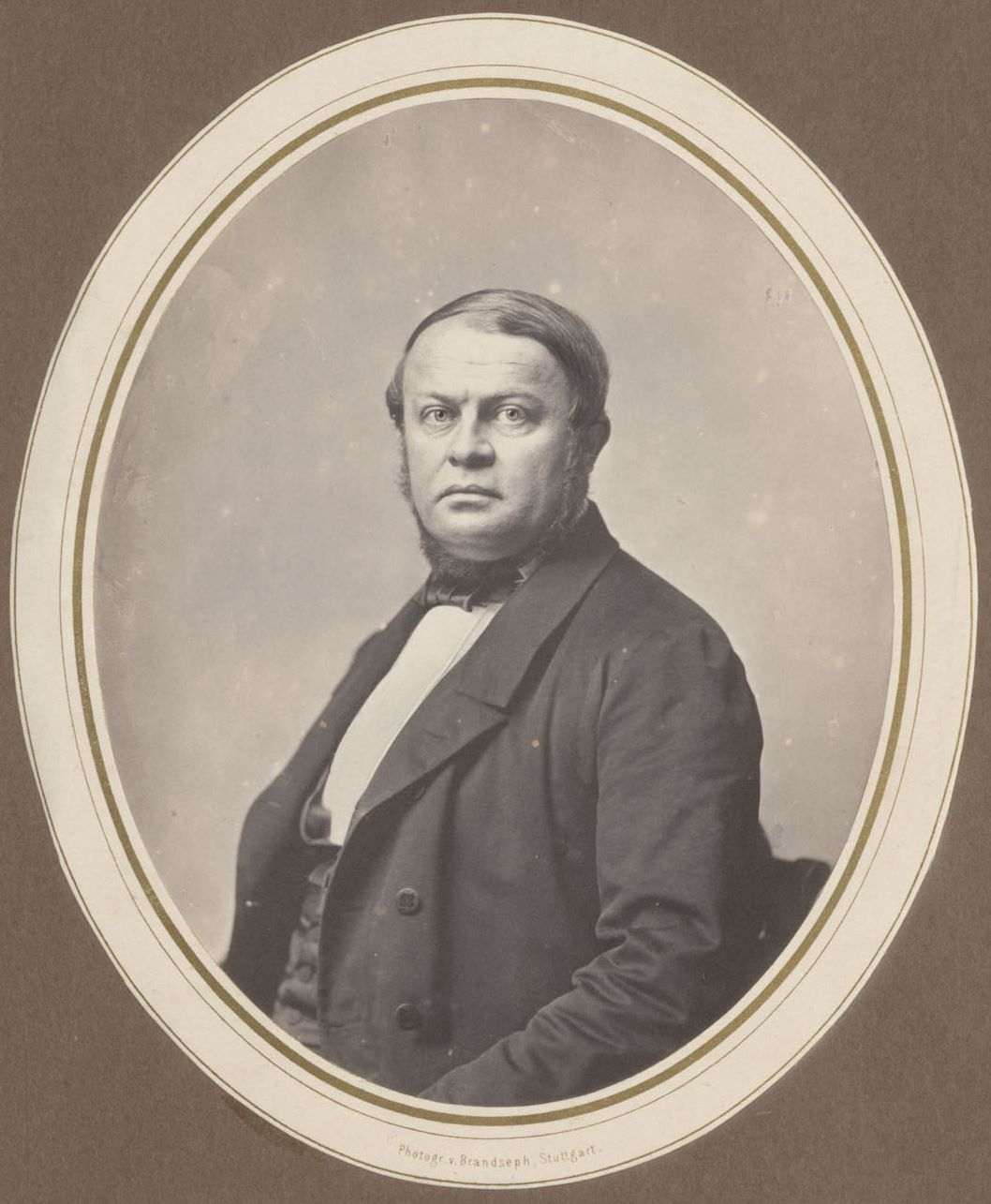 Theodor von Gessler (* 16. August 1821 in Ellwangen; † 27. Juli 1886 in Urach), Jurist und Politiker.